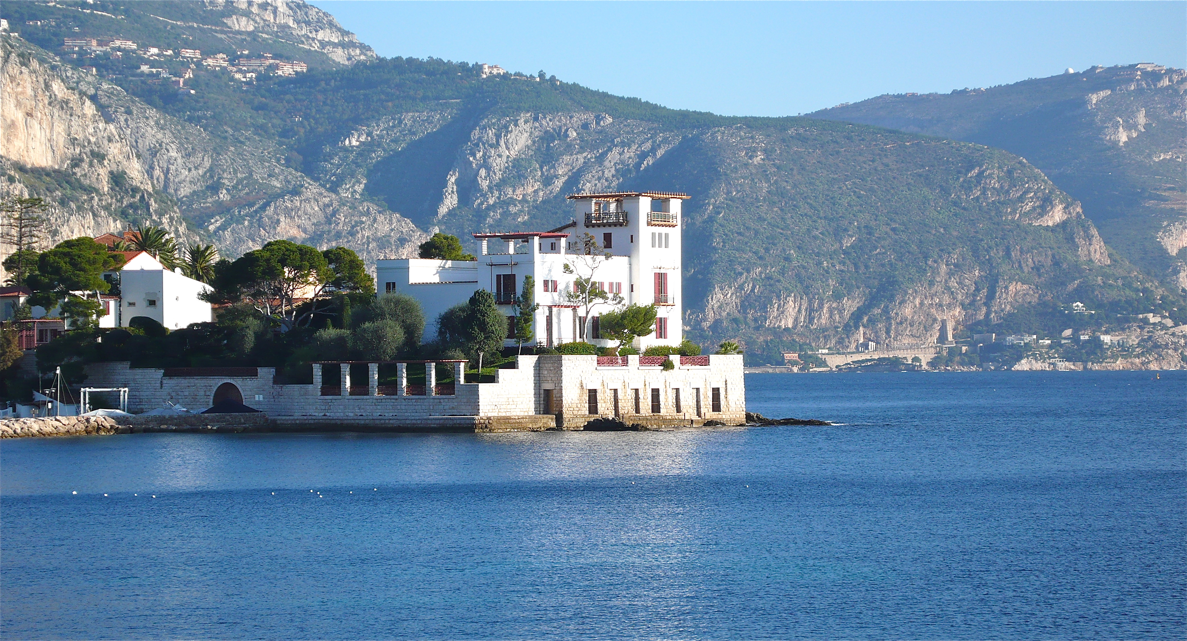 plan panoramique vu sur mer .